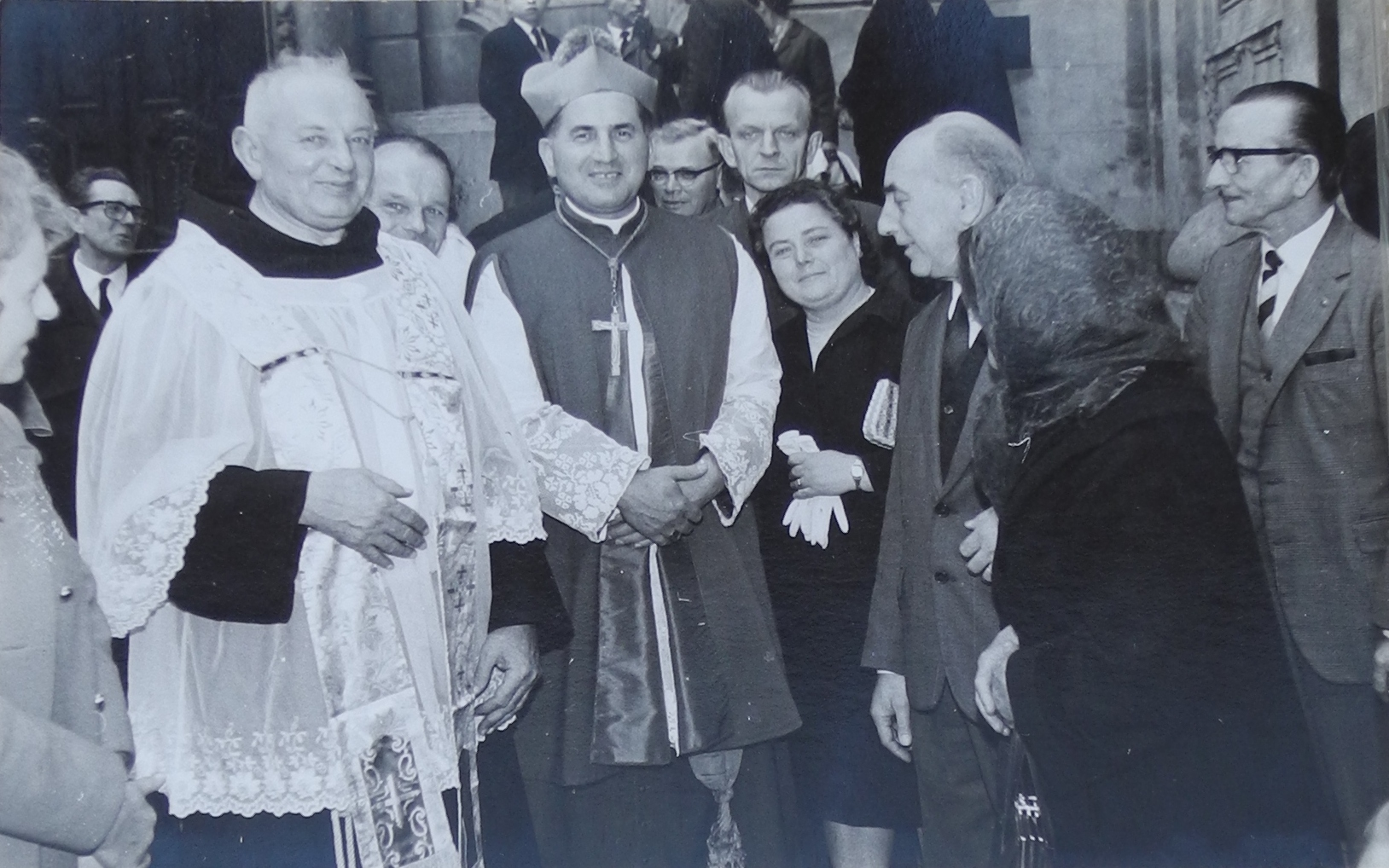 Z Rubinem